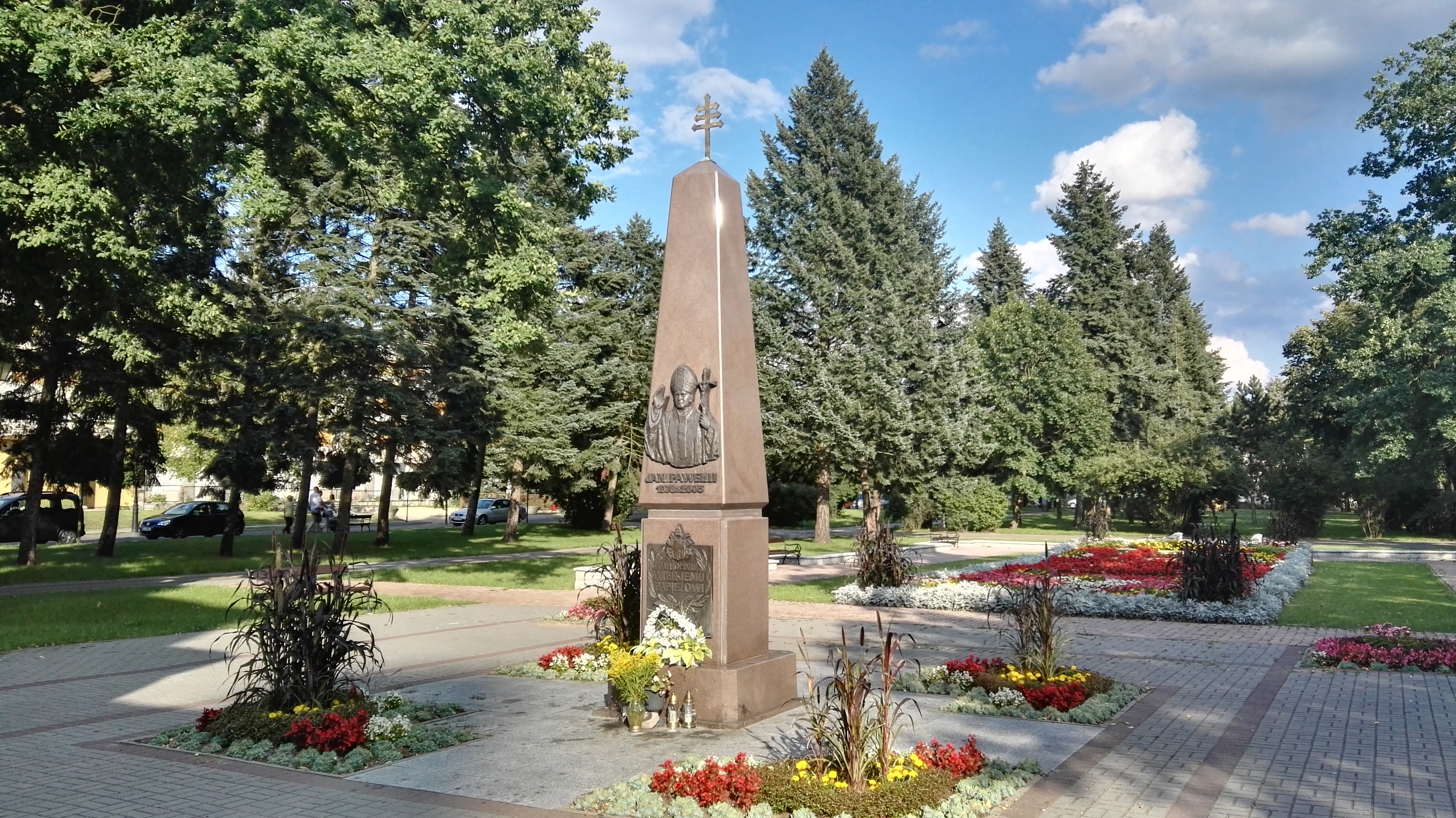 Pomnik św. Jana Pawła II w Ciechocinku